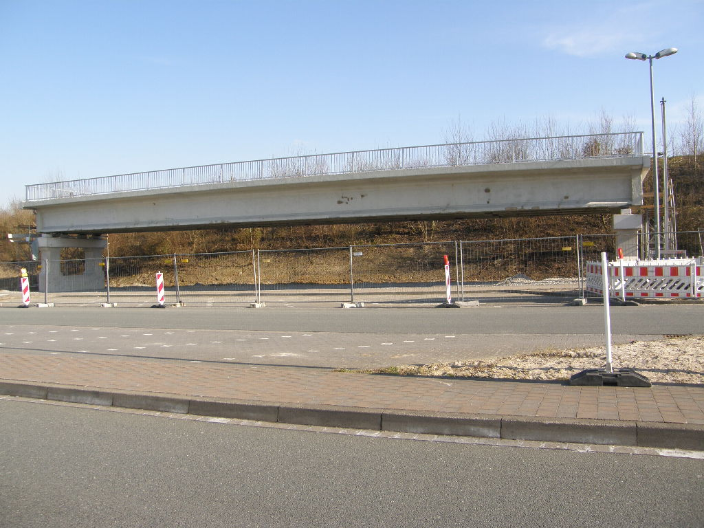 Spannbetonbrücke A2 Rastplatz Vellern (zwischen Beckum und Oelde, Fahrtrichtung Hannover) Es handelt sich um die älteste Autobahn-Spannbetonbrücke der Welt, ehemals Überführung Weg Hesseler